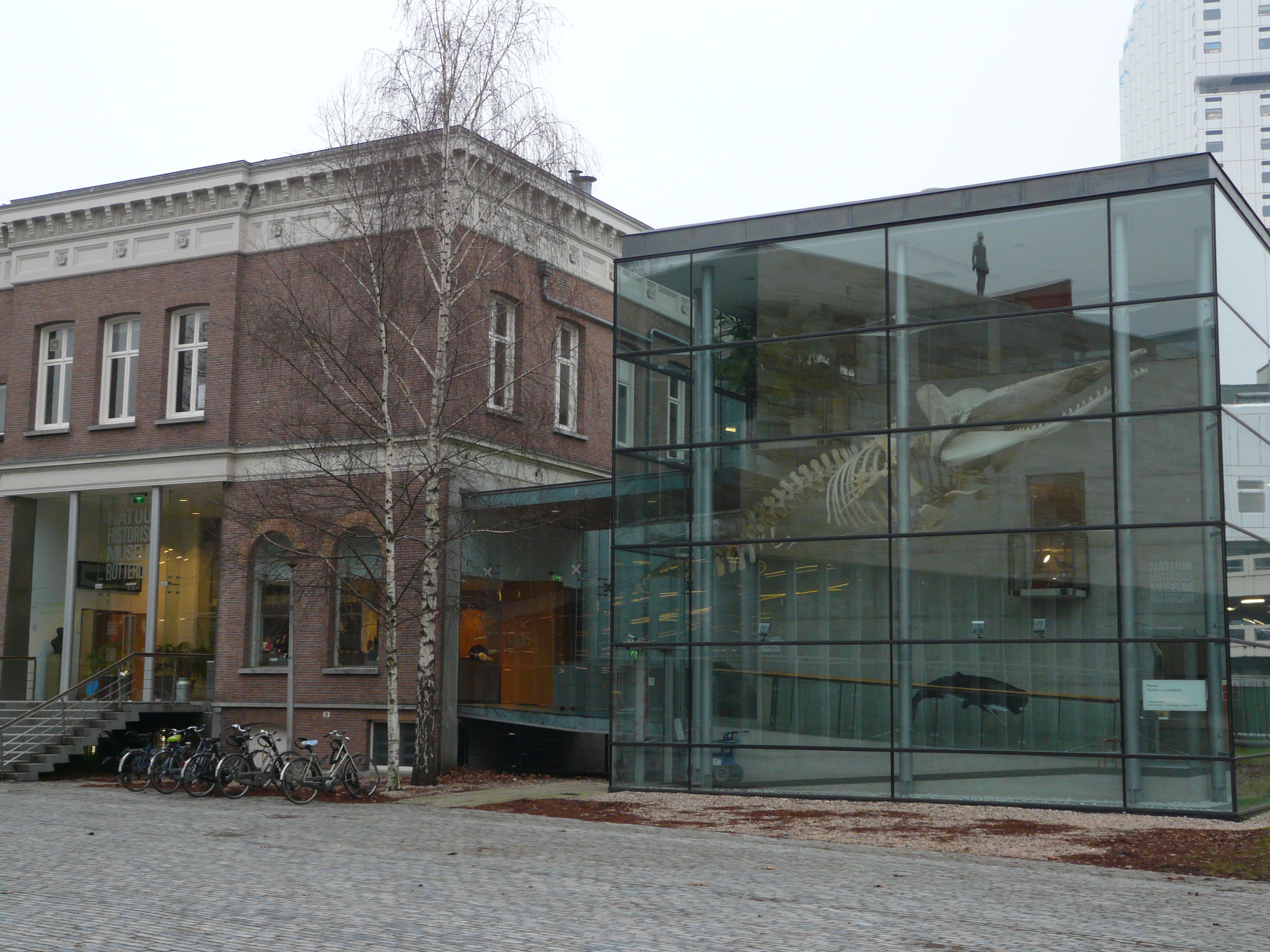 Natuurhistorisch Museum Rotterdam